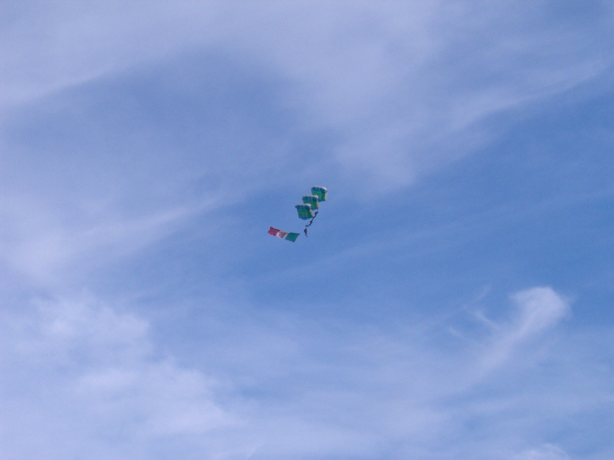 I paracadutisti acrobatici del "Consubin" stanno per ammarrare